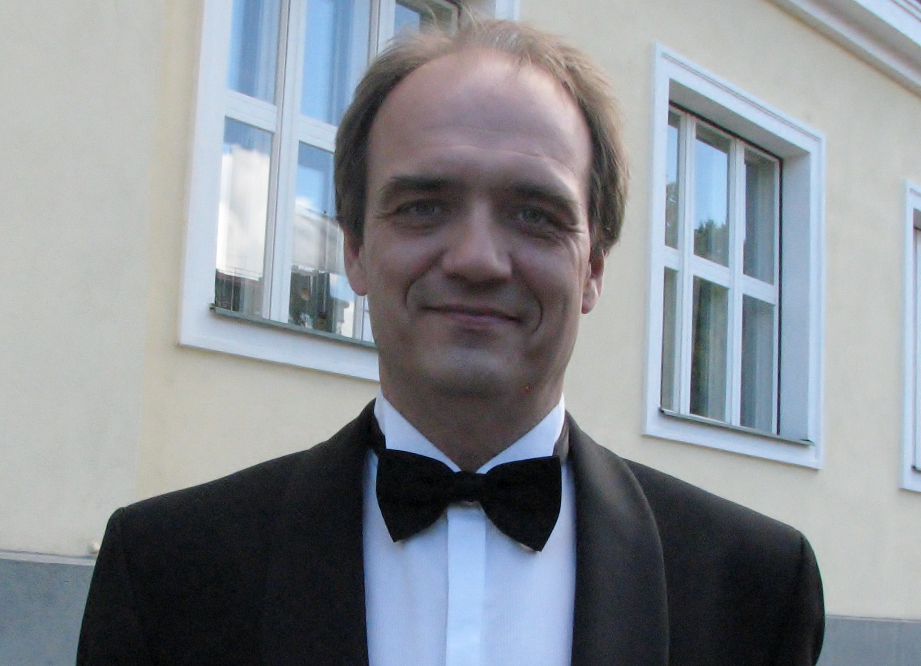 Hirvo Surva Rahvusooper Estonia 107. hooaja avamisel